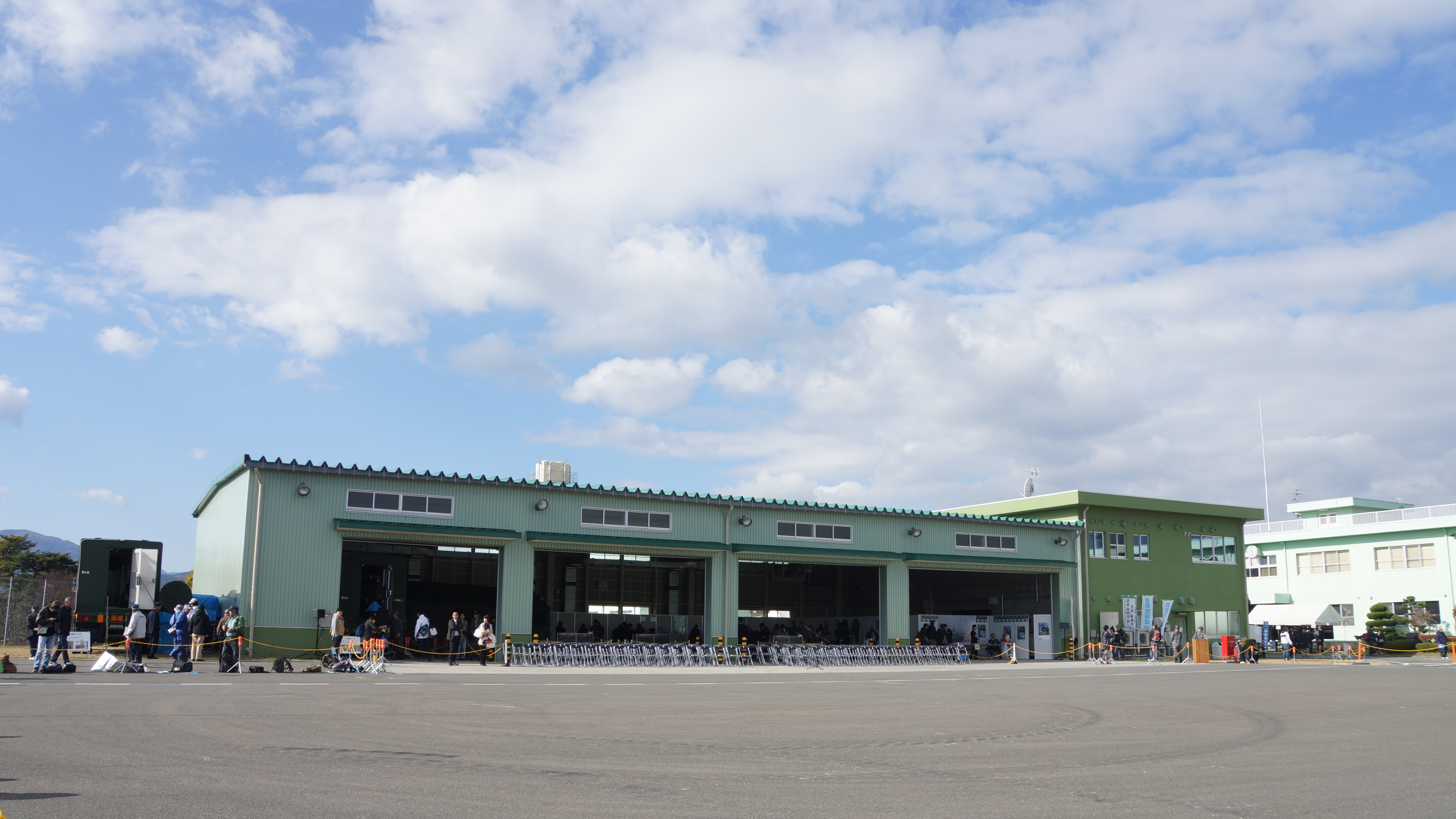 航空自衛隊 饗庭野分屯基地 車庫。2015年11月30日撮影。